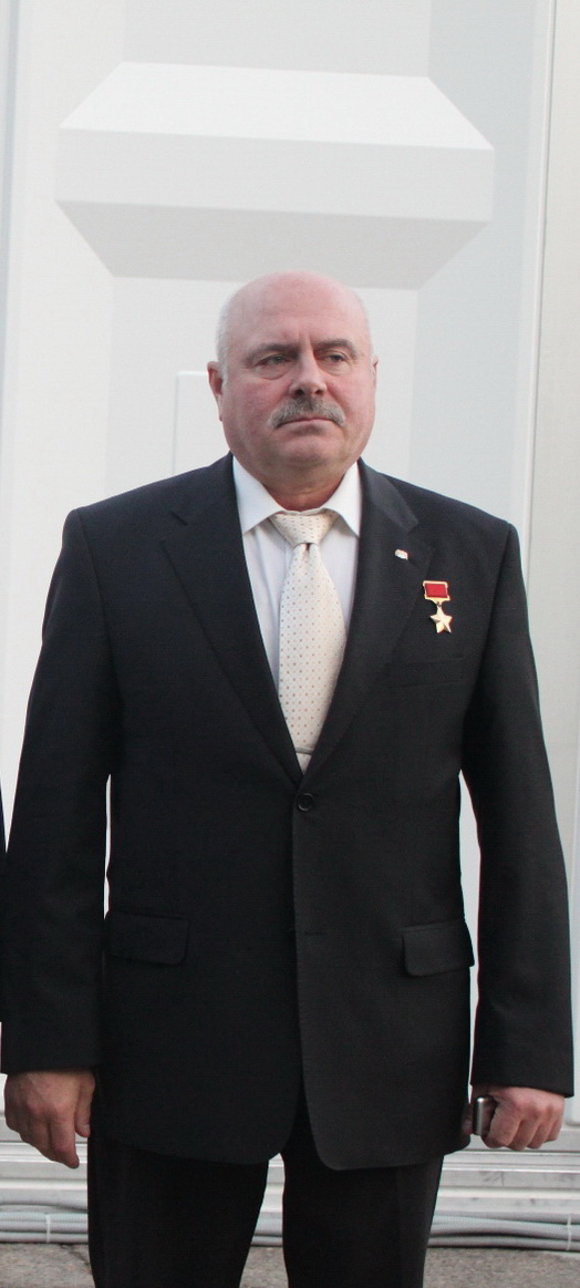 Плосконос Игорь Николаевич